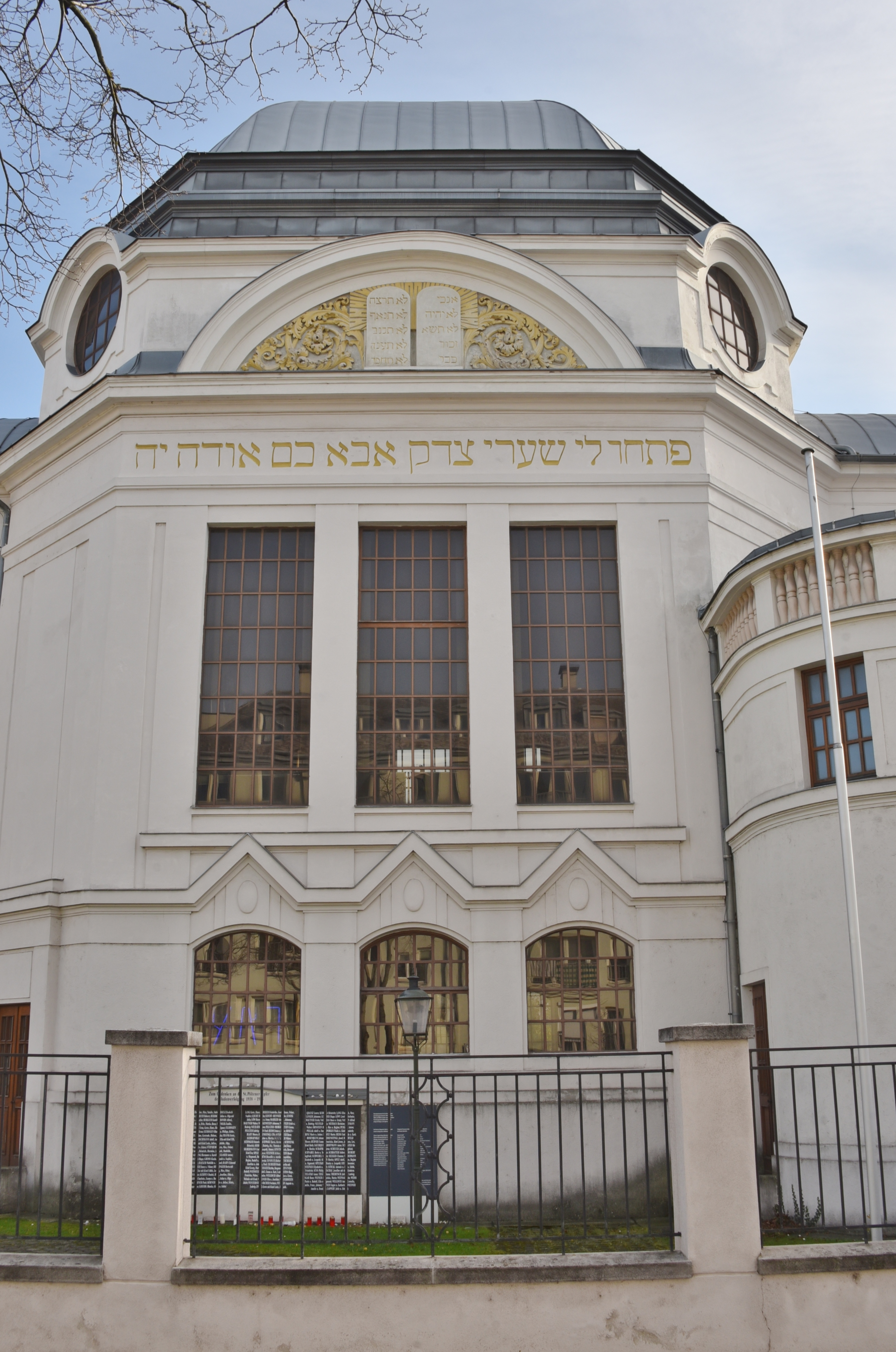 Synagoge St. Pölten